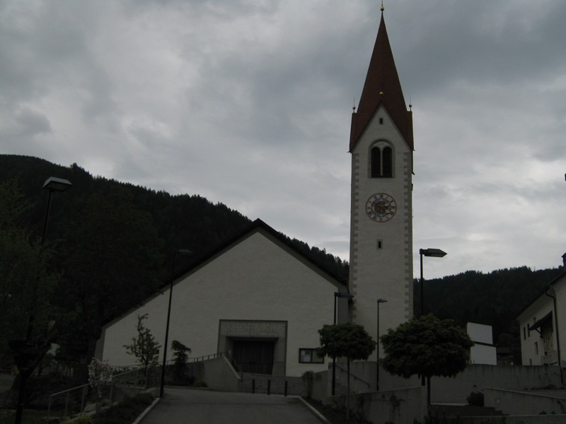 Chiesa di Sant Andrea